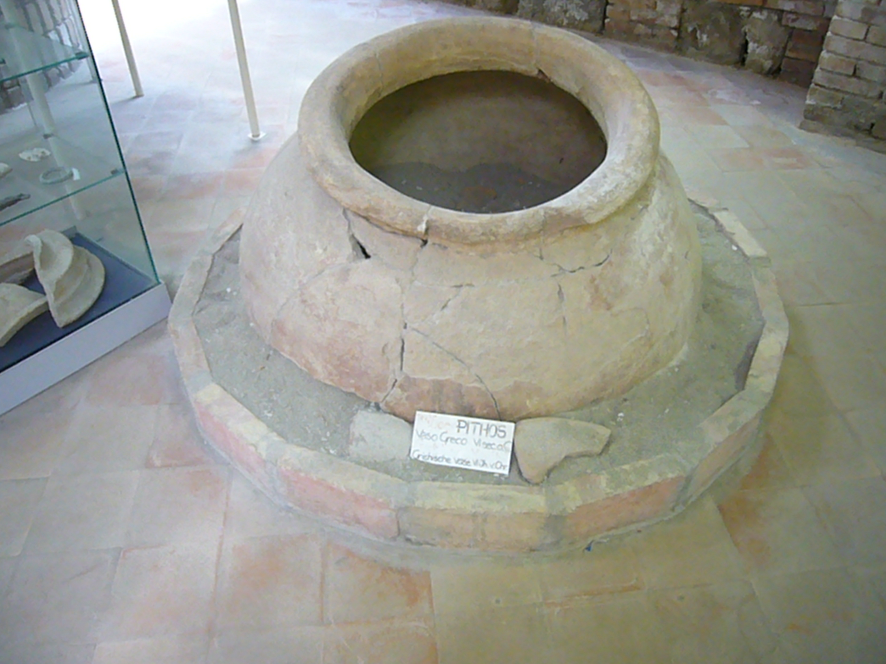 Lacco Ameno, scavi del museo di S. Restituta, pithos (VI sec. a.C.)